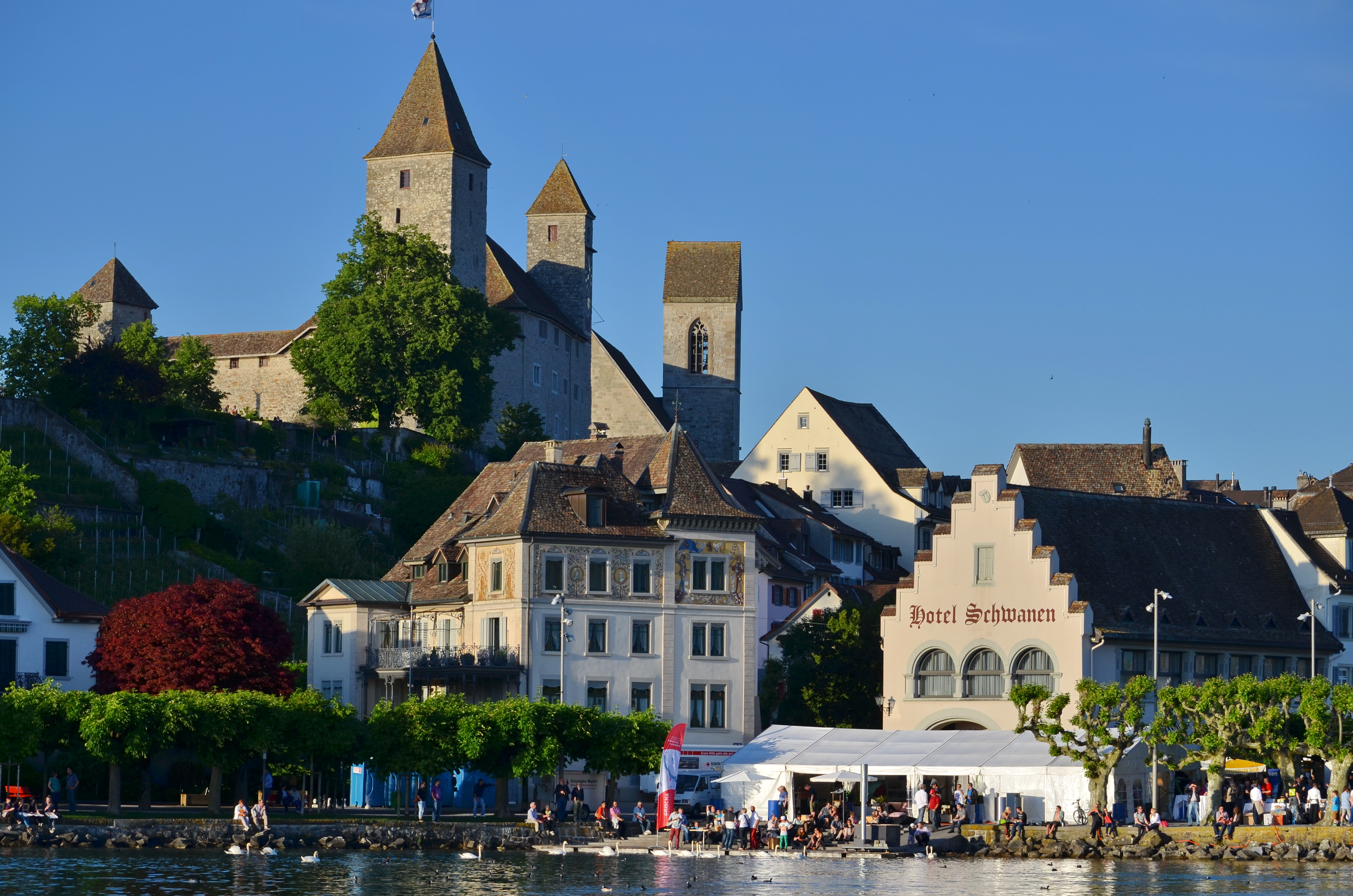 Endingerplatz in Rapperswil (Switzerland) : Curti-Haus, Haus Schlossberg, Hotel Schwanen, towers of Schloss Rapperswil and Stadtpfarrkirche Rapperswil in the Background